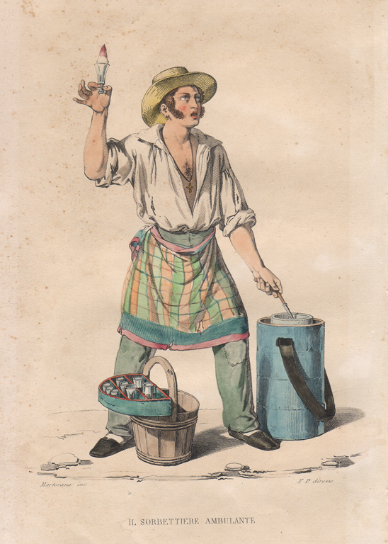 Il Sorbettiere Ambulante : Acquaforte, tratta dall'opera "Usi e costumi di Napoli e contorni descritti e dipinti..." di Francesco De Bourcard - Napoli, 1853, Italia.